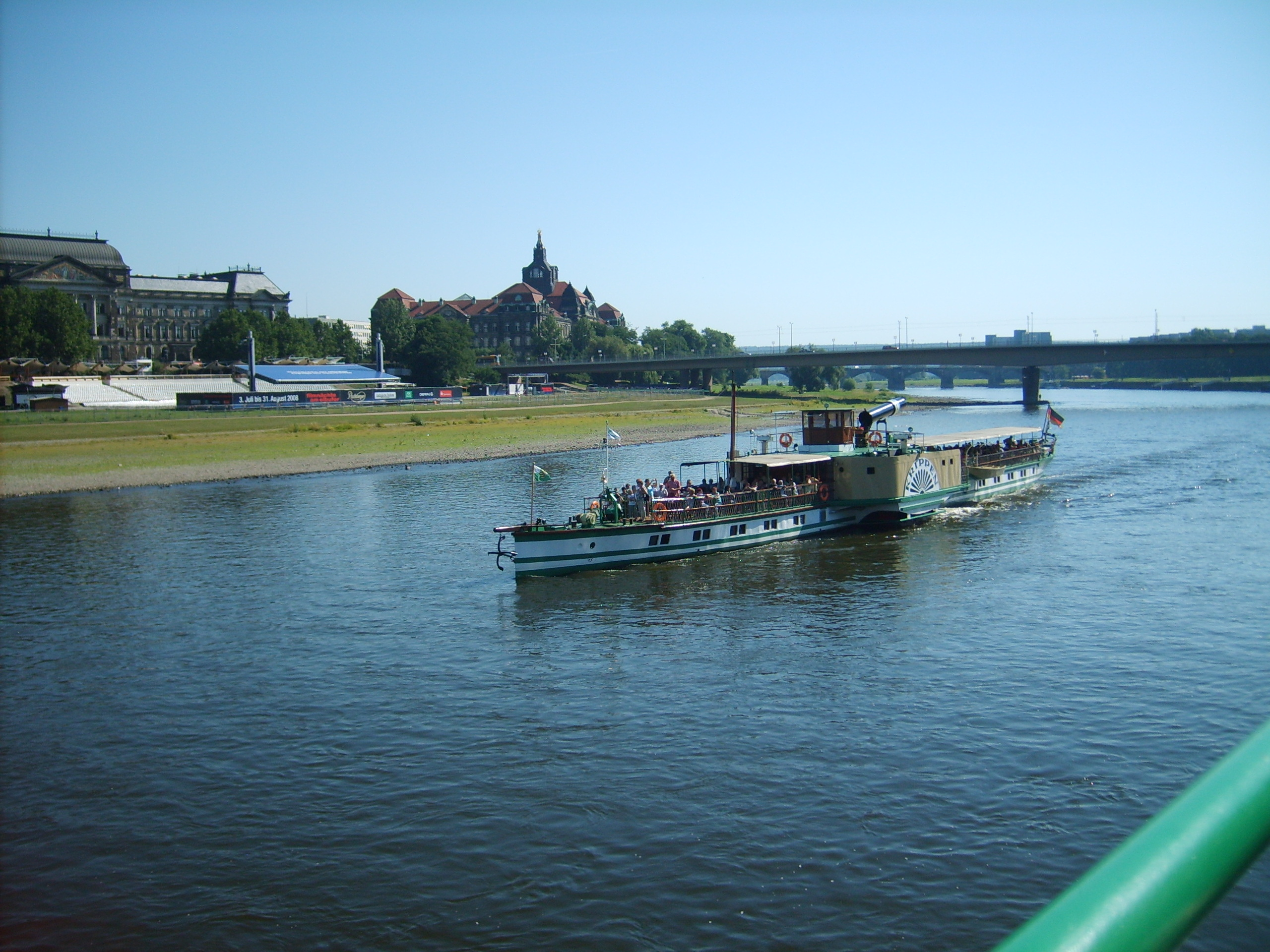 Dresdner Elbtal